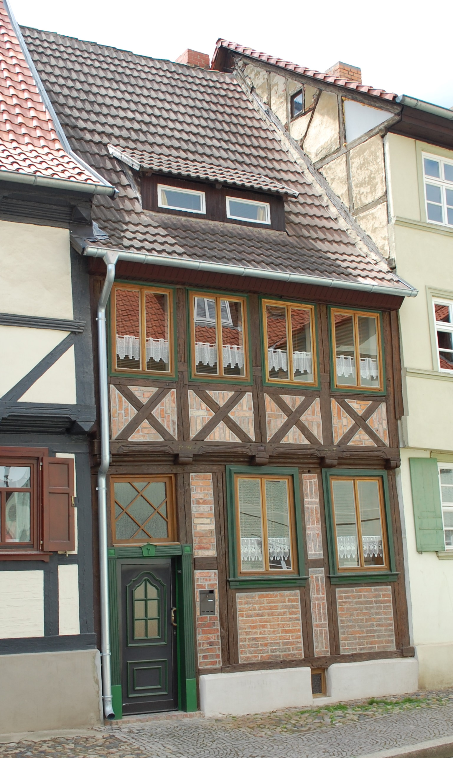 Haus in der Straße Kaplanei in Quedlinburg